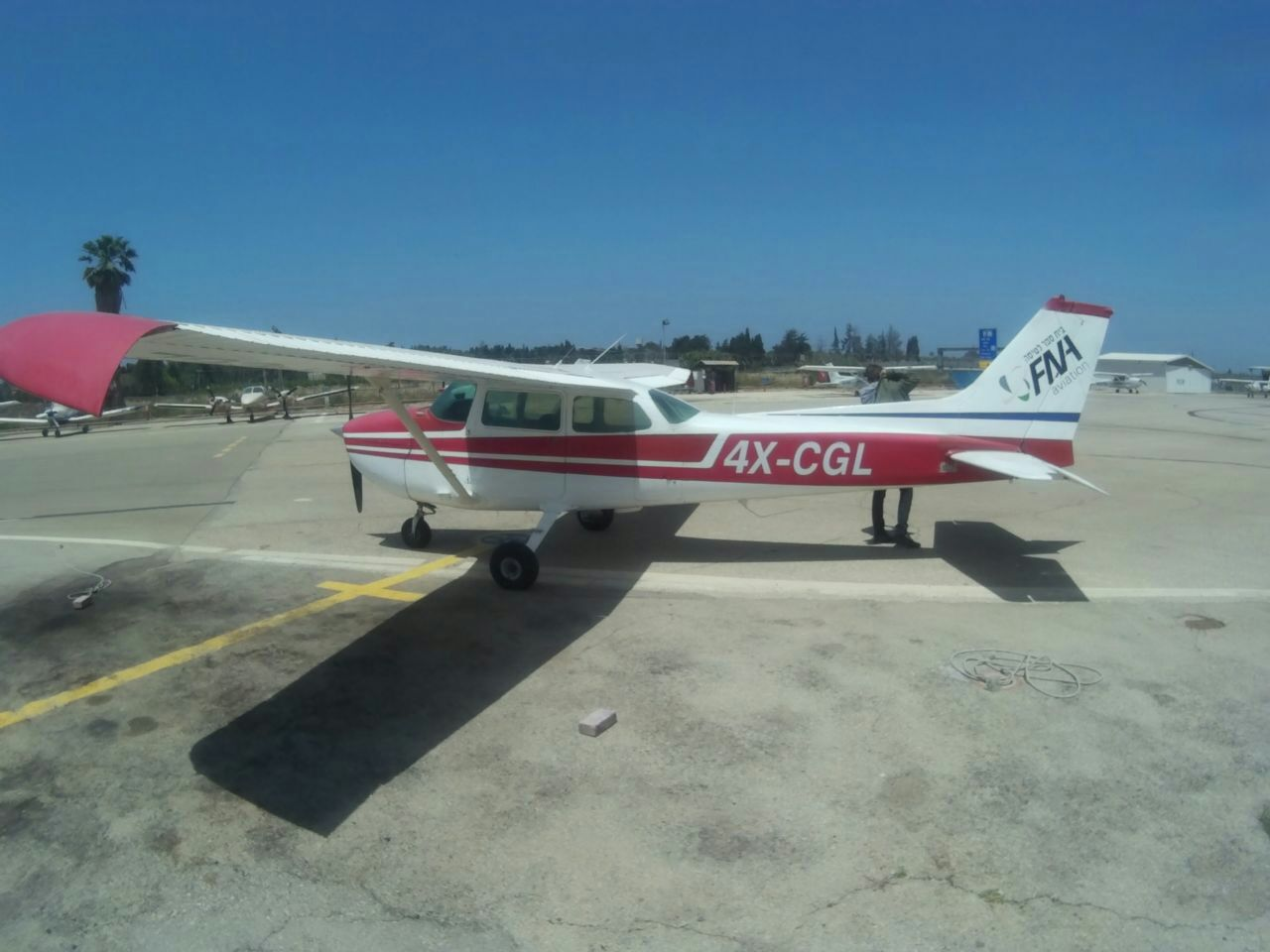 מטוס מדגם ססנה 172 בנמל התעופה הרצליה